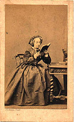 Luísa Margarida de Barros Portugal (1816-1891), condessa de Barral, amante de D. Pedro II.